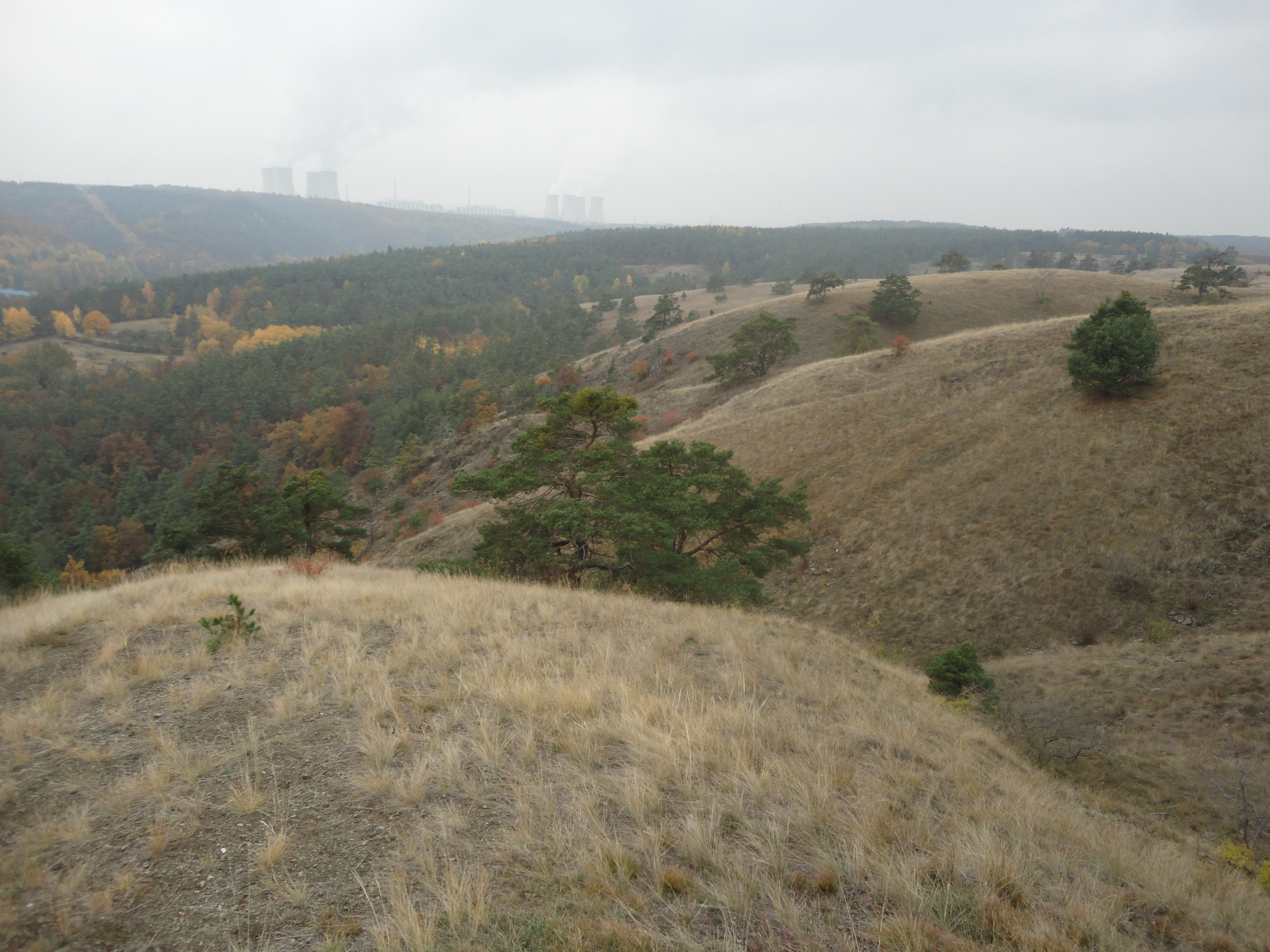 Mohelenská hadcová step